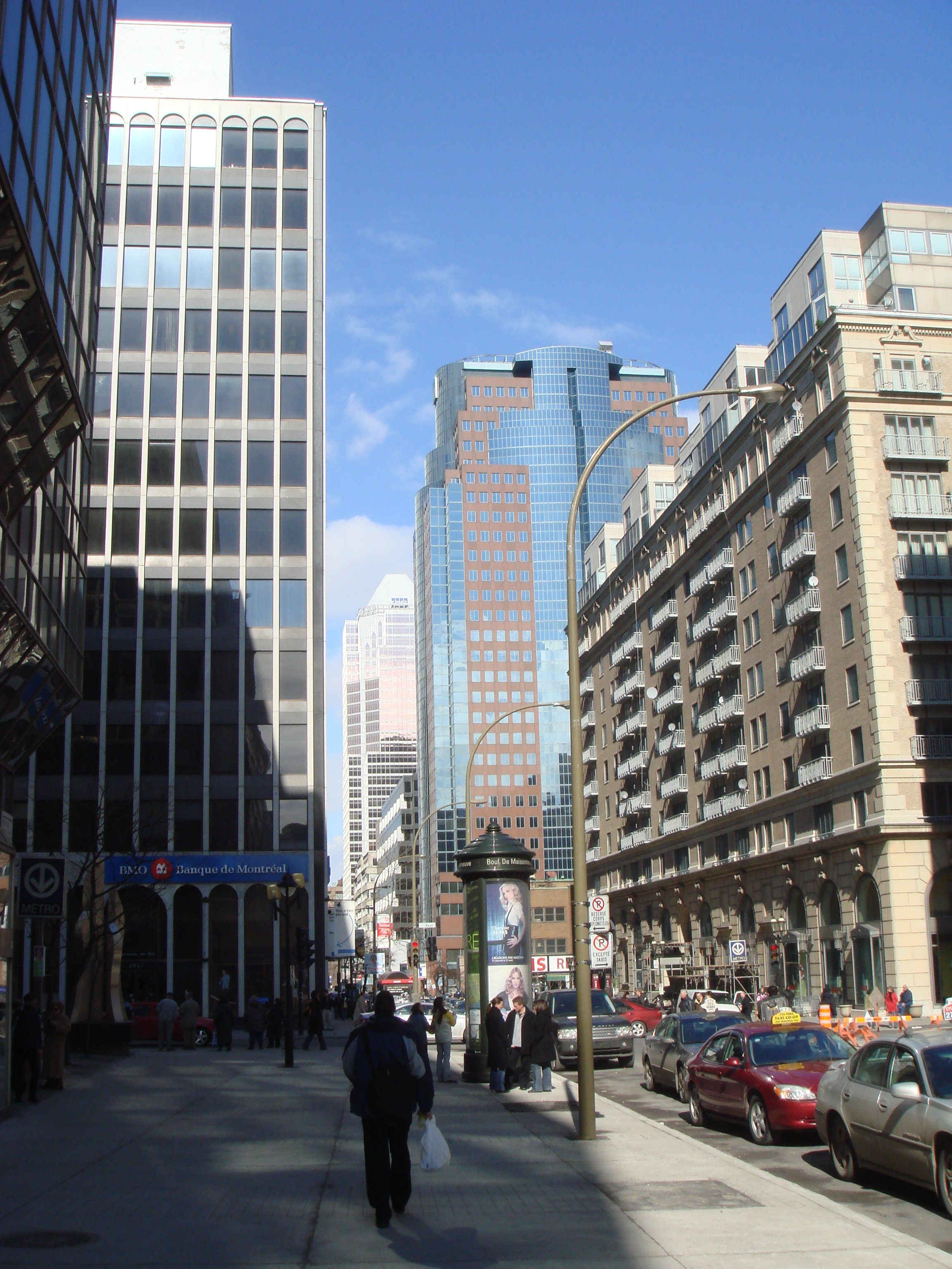 Le boulevard de Maisonneuve à l'angle de la rue Peel.